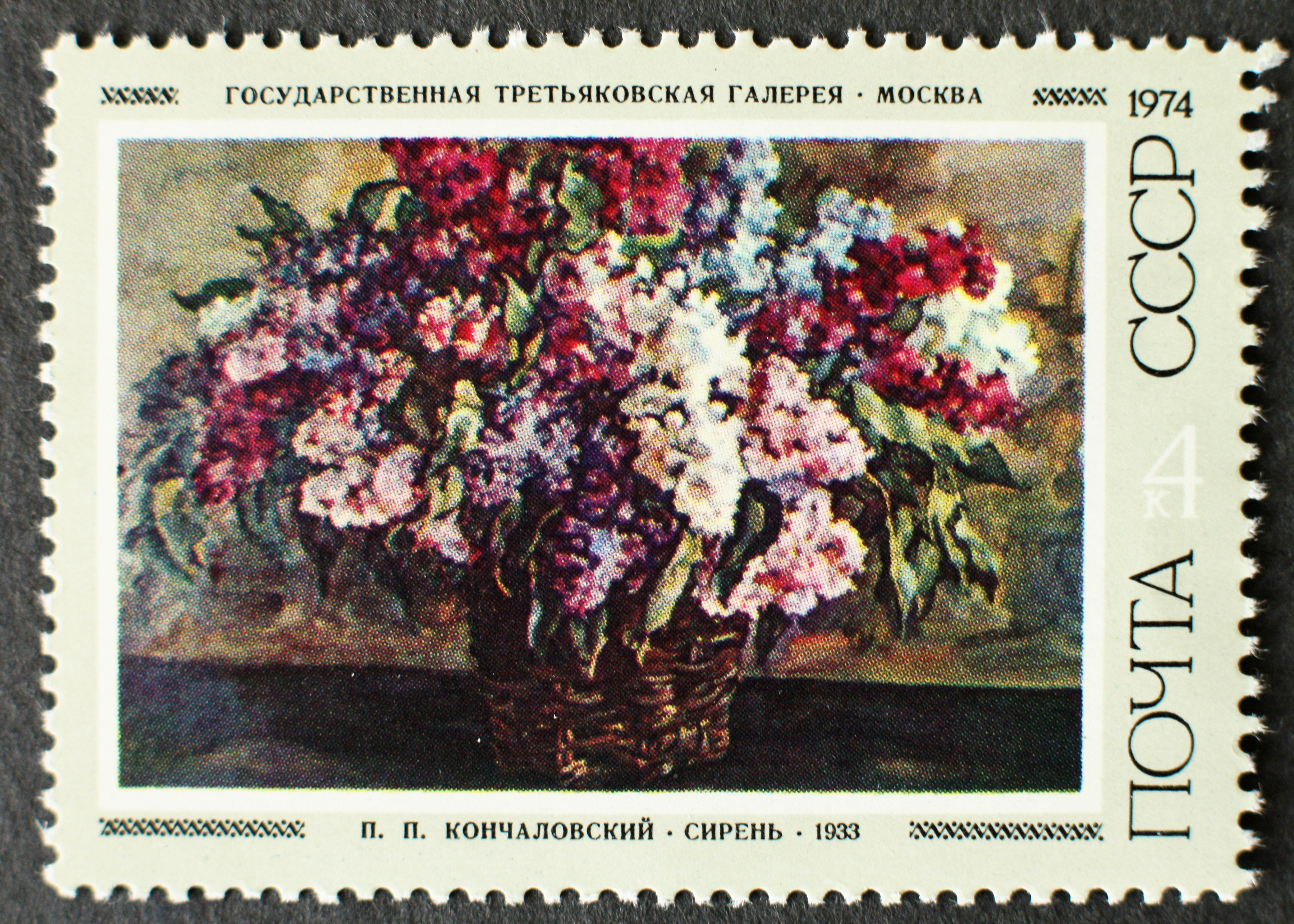 Briefmarke, Sowjetunion